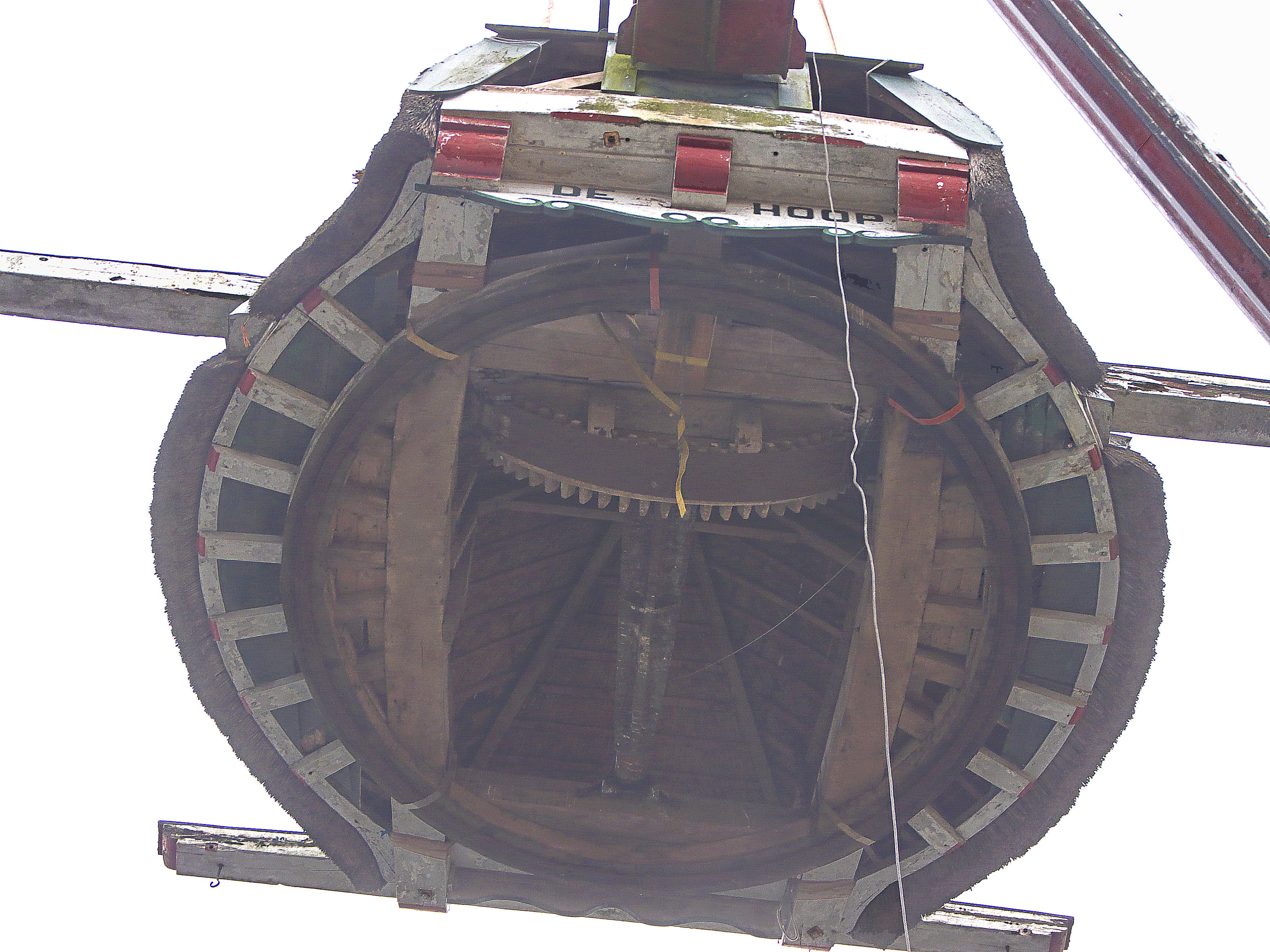 Molen De Hoop, Oldebroek, kap in de takels voor de tweede keer